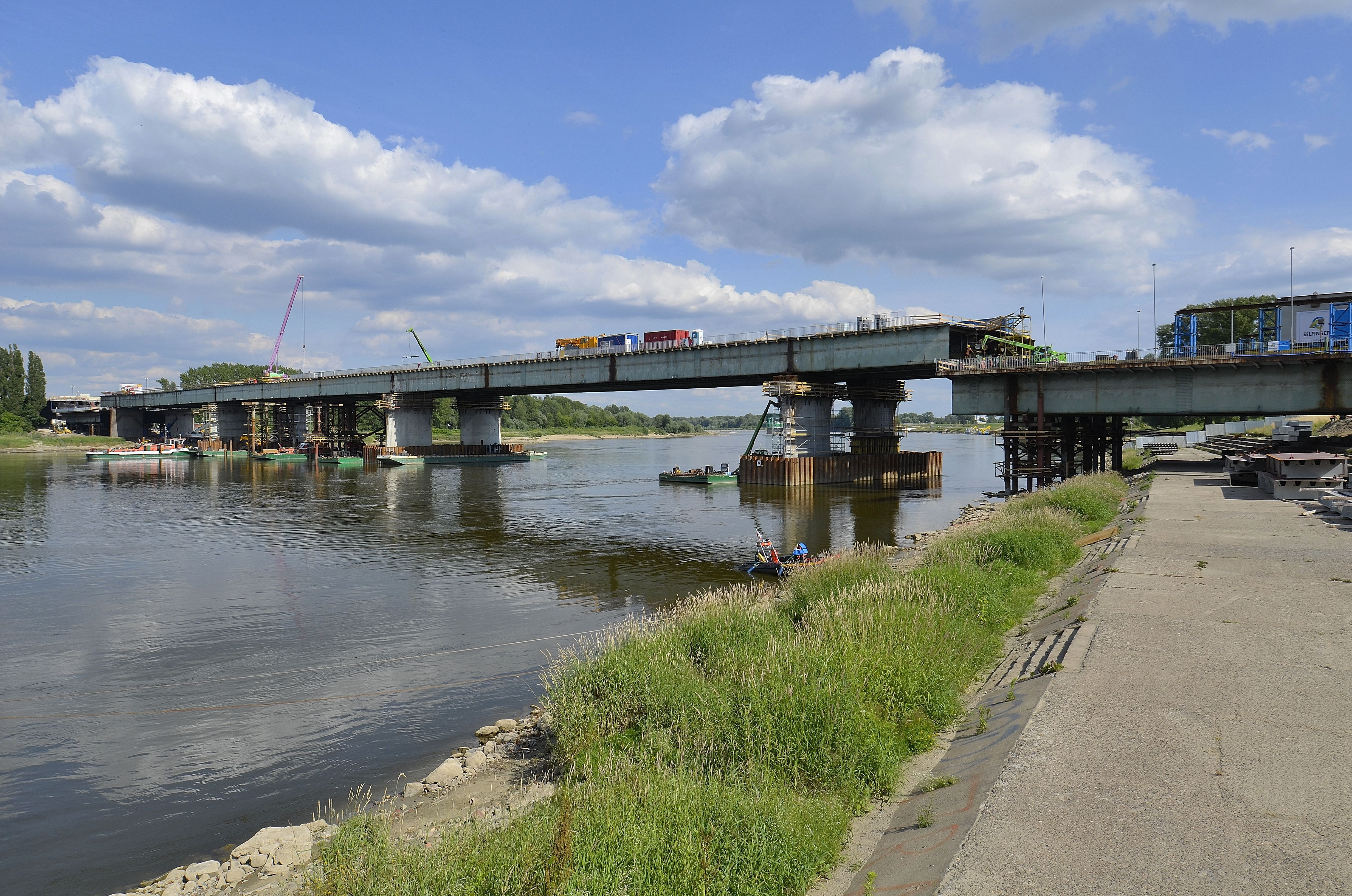 Remont mostu Łazienkowskiego w Warszawie